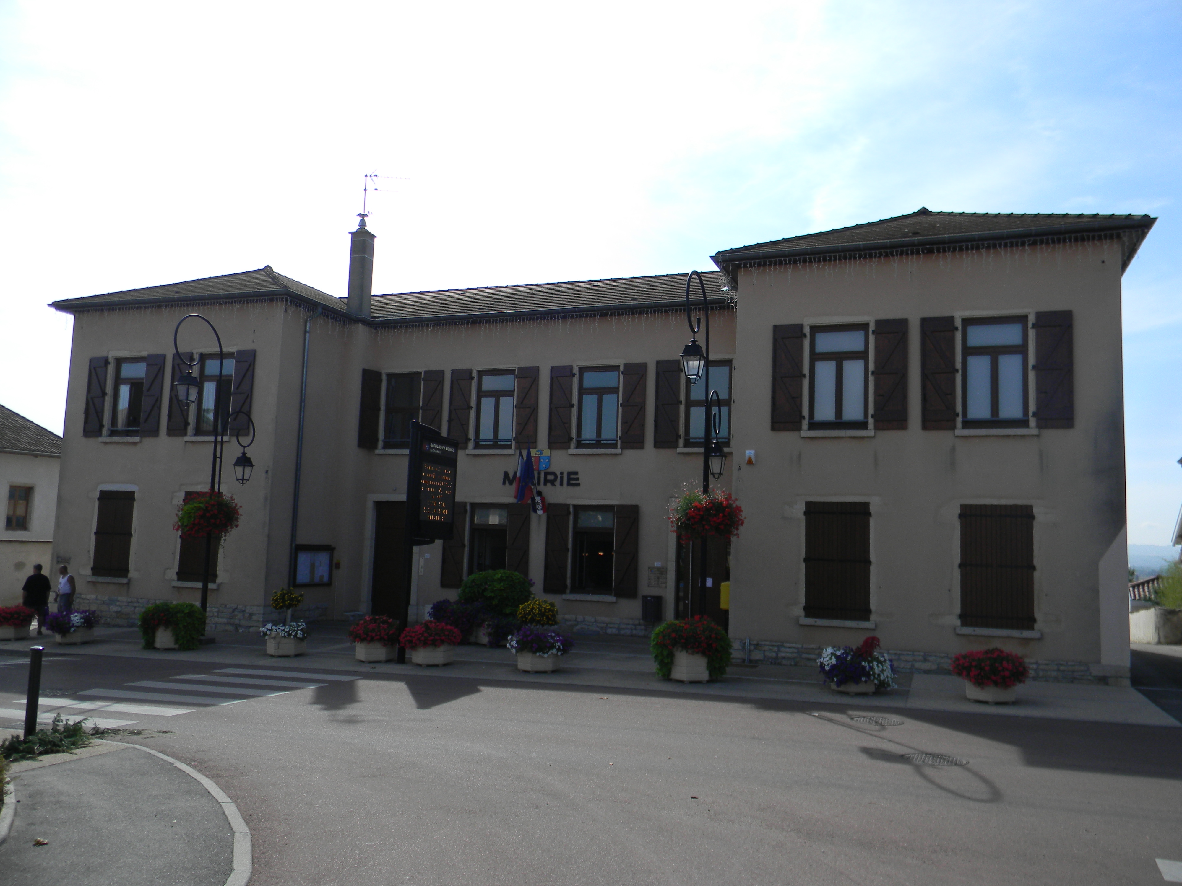 Mairie de Satolas-et-Bonce.